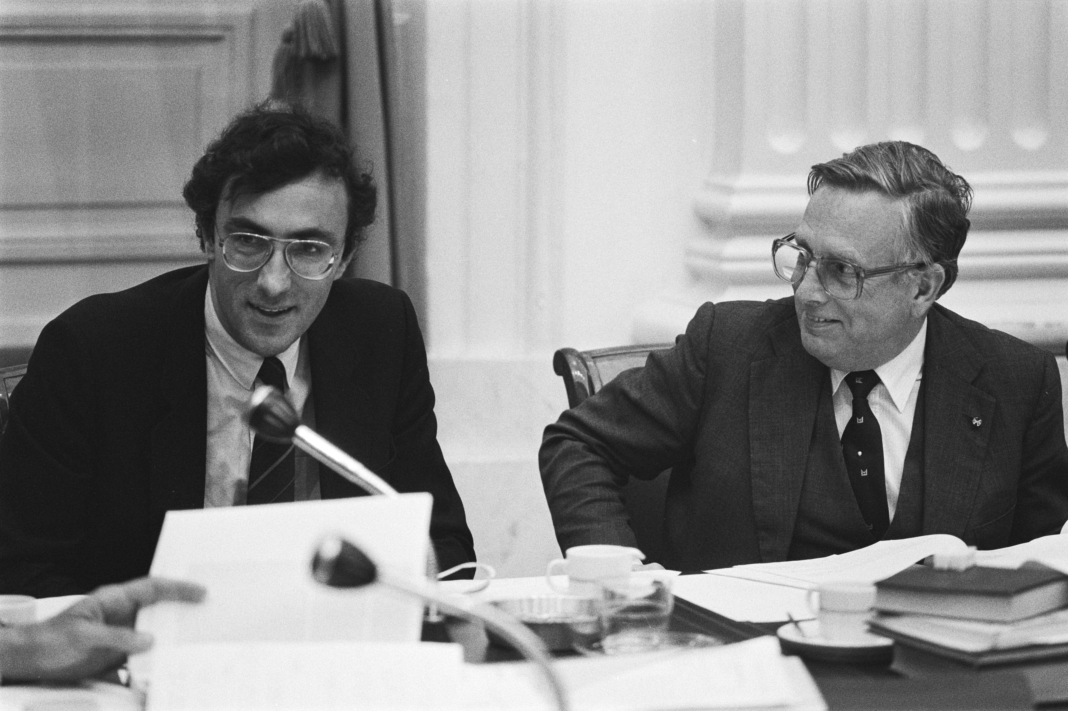 Collectie / Archief : Fotocollectie Anefo Reportage / Serie : [ onbekend ] Beschrijving : Tweede Kamer , commissievergadering over Deregulering (rapport Geelhoed); prof. Geelhoed (l) en minister Korthals Altes (Just.) achter regeringstafel / Datum : 9 mei 1984 Trefwoorden : politiek Persoonsnaam : Minister Korthals Altes, Prof. Geelhoed Instellingsnaam : Tweede Kamer Fotograaf : Antonisse, Marcel / Anefo Auteursrechthebbende : Nationaal Archief Materiaalsoort : Negatief (zwart/wit) Nummer archiefinventaris : bekijk toegang 2.24.01.05 Bestanddeelnummer : 932-9615